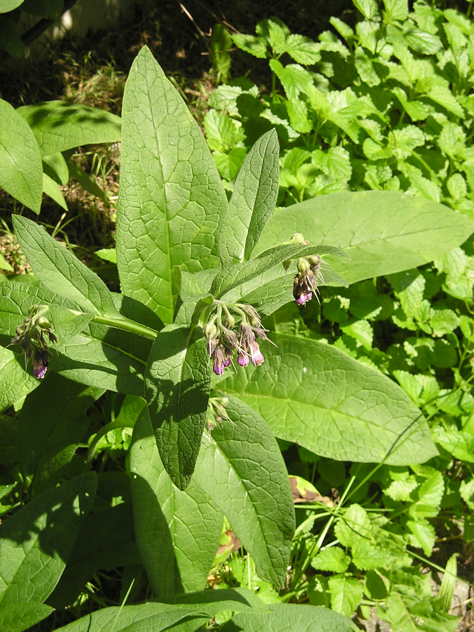 Beinwell